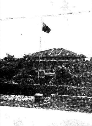 位於台北市宮前町的中華民國駐台北總領事館。《外部週刊》係1930年代的南京國民政府外交部出版品，故無版權問題。